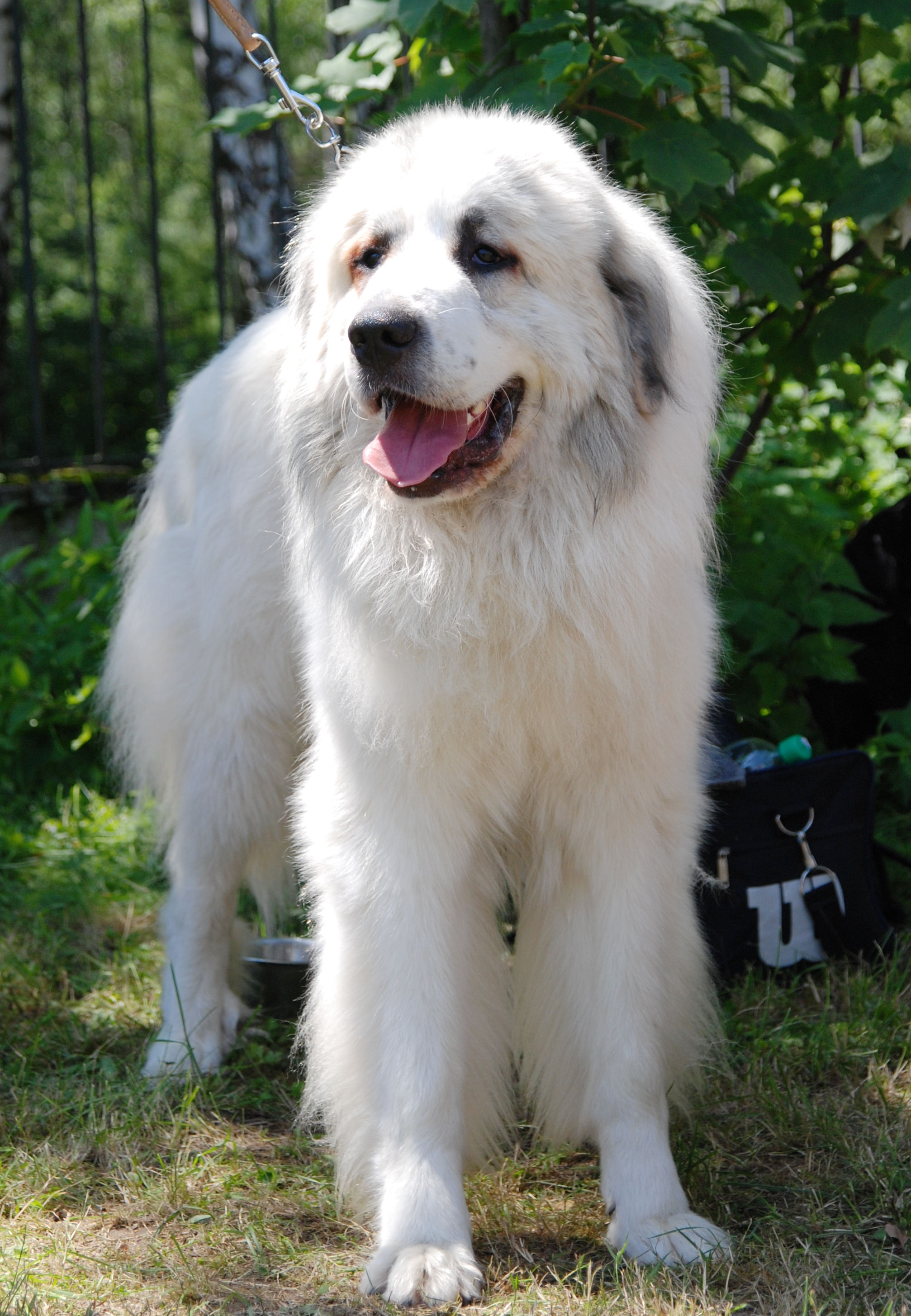 Chien de Montagne des Pyrénées, XI International Dog Show in Kraków